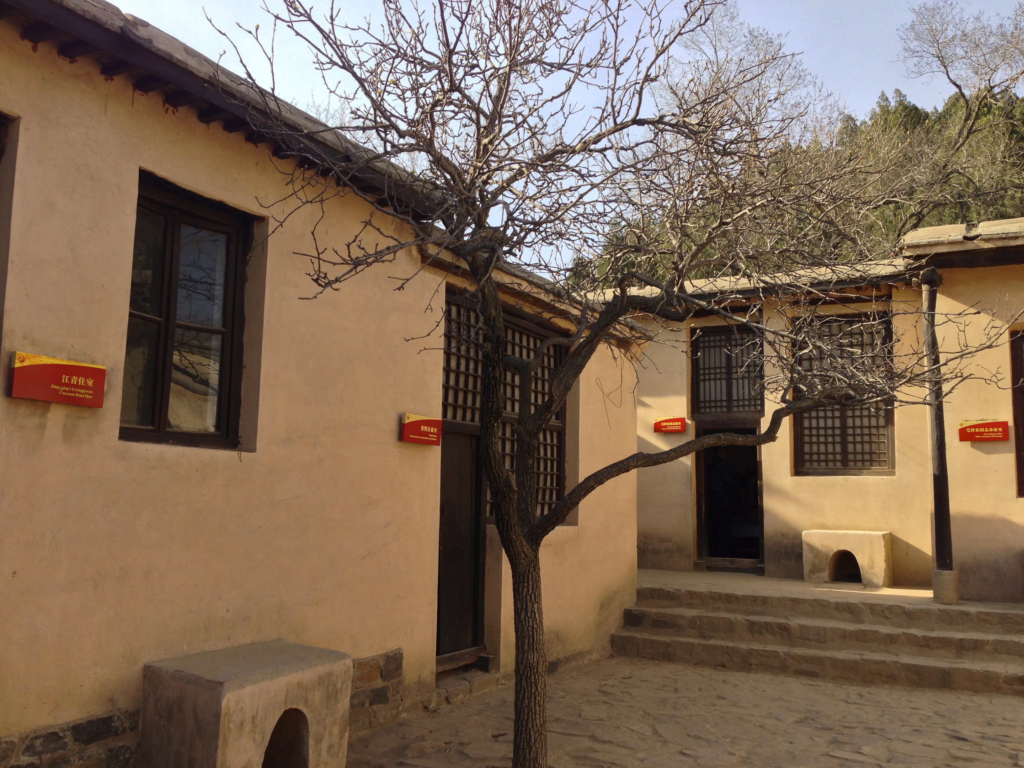 毛澤東舊居